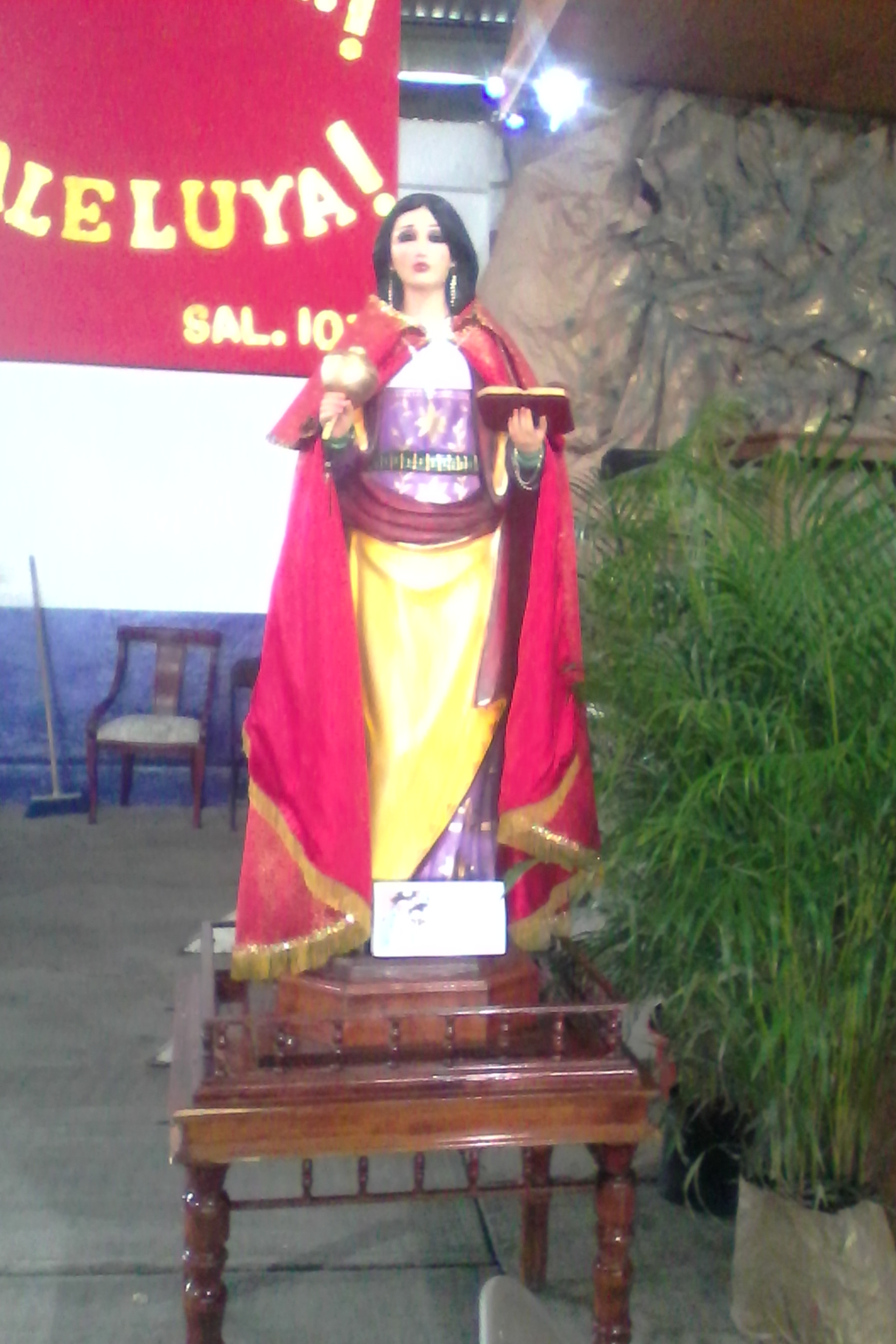 Santa María Magdalena Patrona De Magdalena Chichicaspa